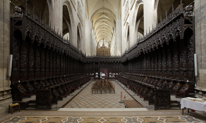 stalles .